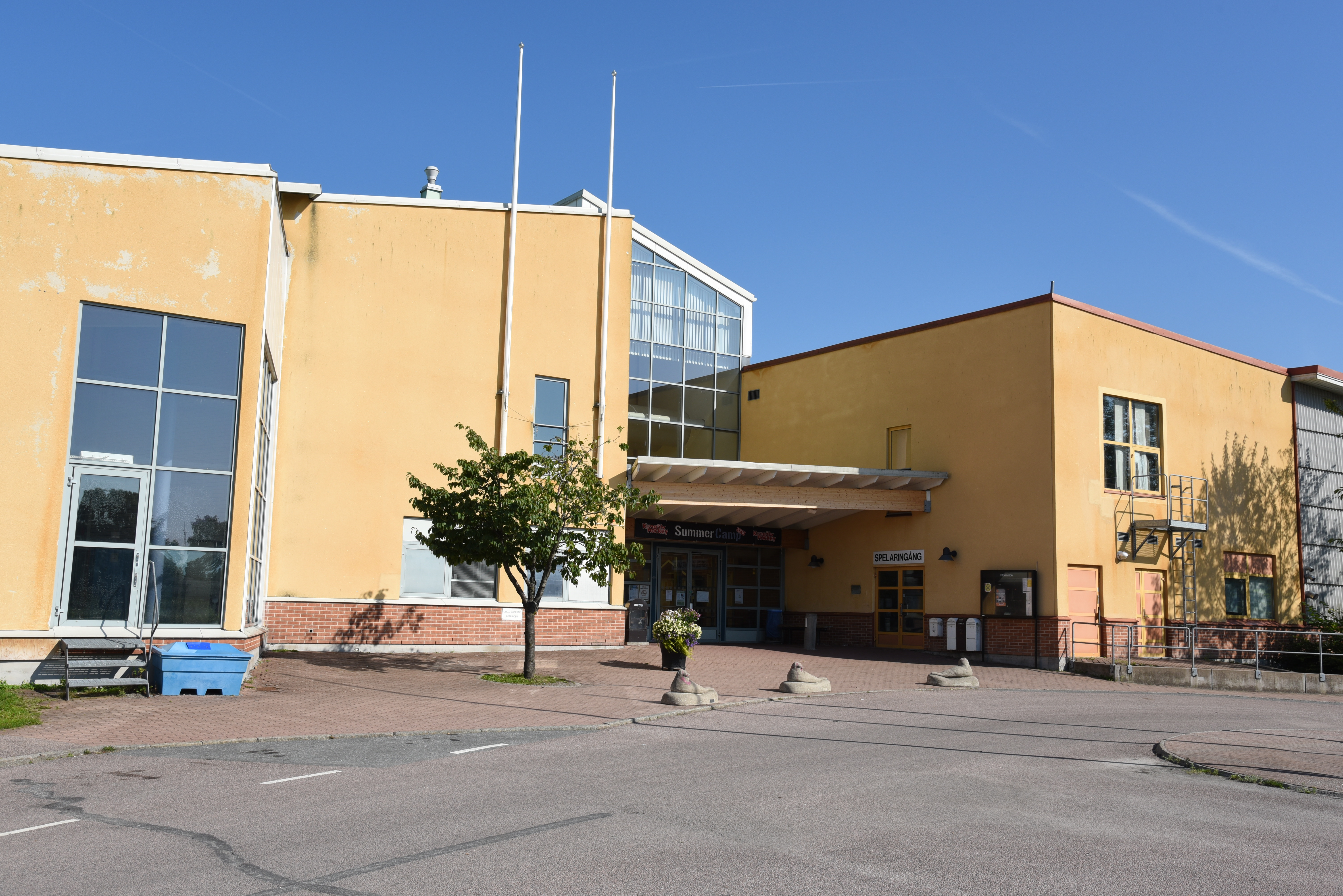 Oasen sim- och ishall i Kungälv.